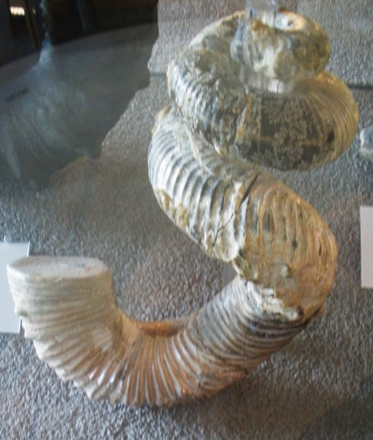 Fossil of Didymoceras, an extinct mollusc - Took the photo at Naturalis museum, Leiden